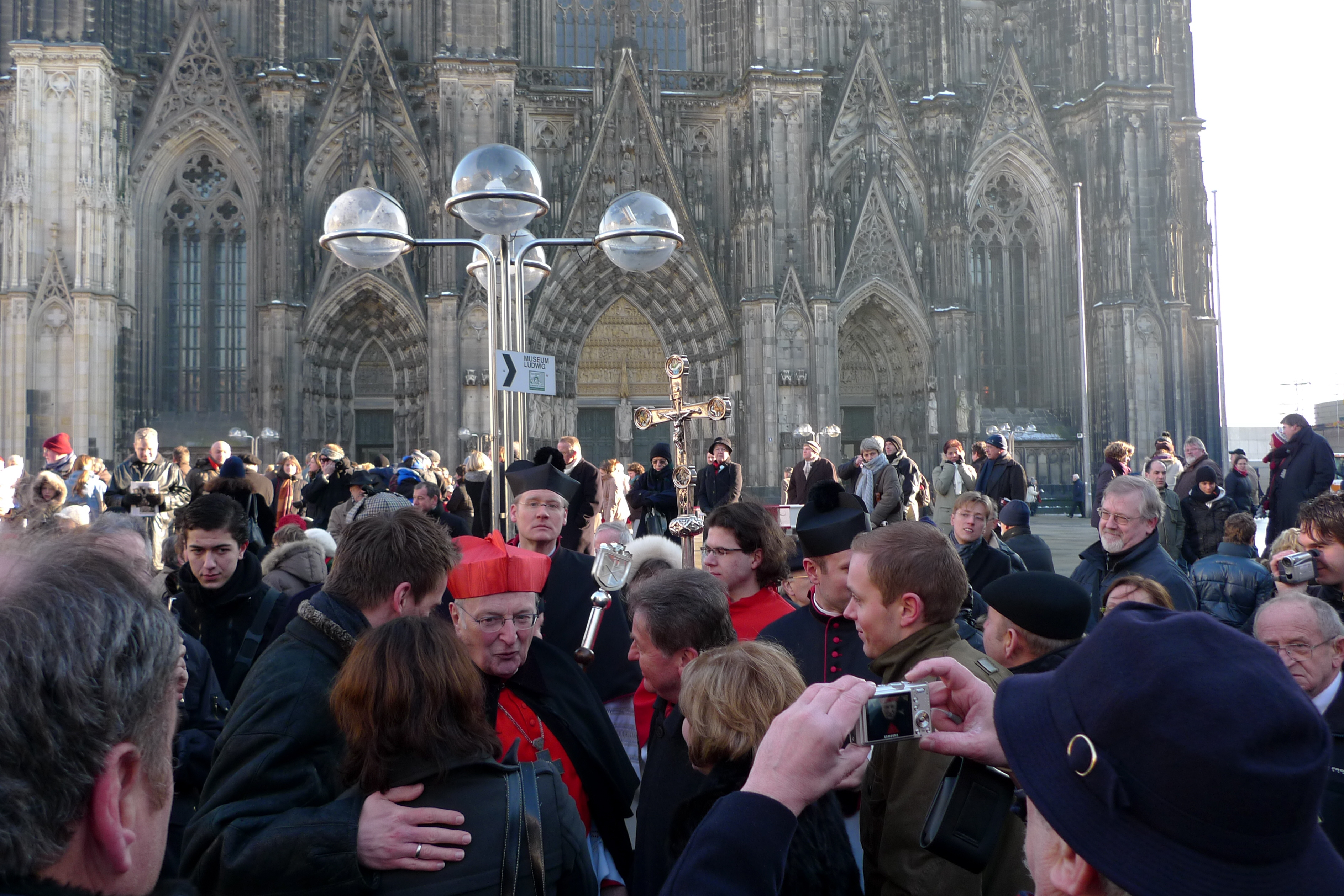 Kardinal Meisner (Bildmitte) nach einer Feier eines Pontifikalhochamtes im Kölner Dom aus Anlass seines 75. Geburtstags.